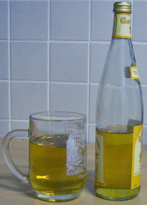 Met-Flasche und Glas